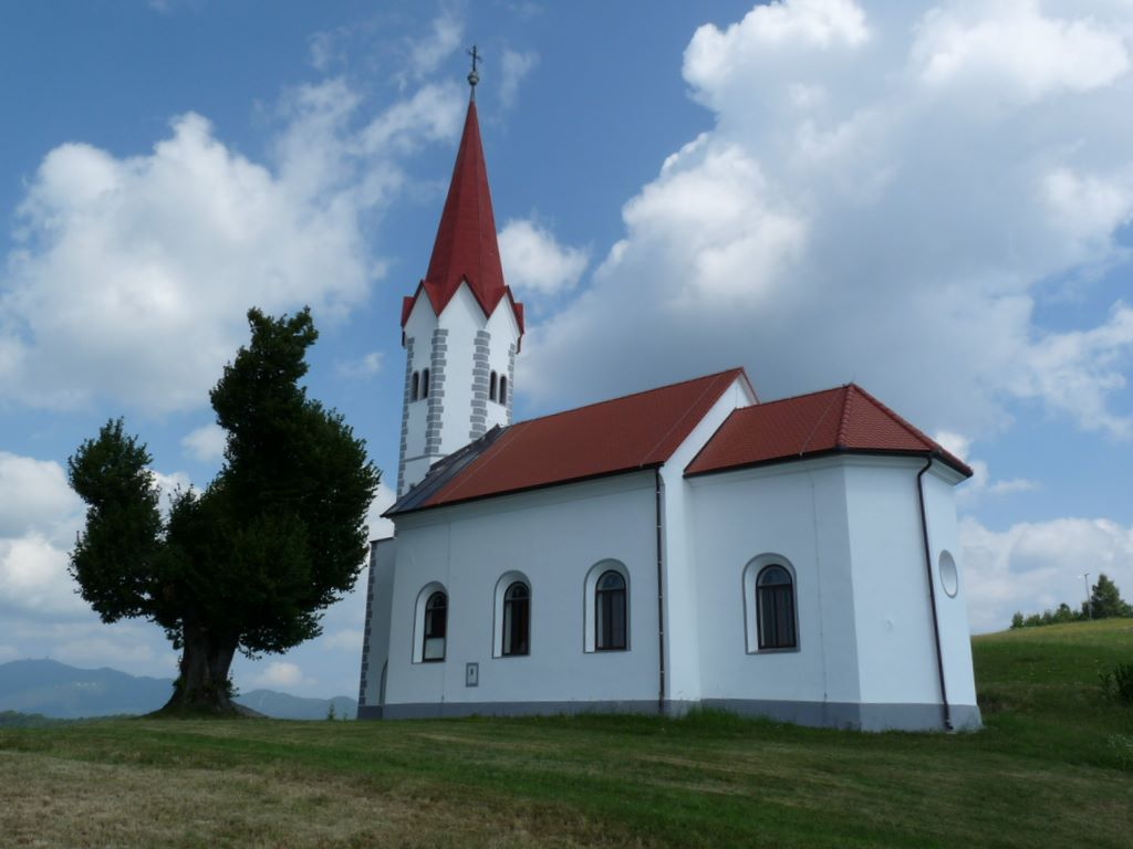 Cerkev Žalostne Matere božje na Leskovškem hribu